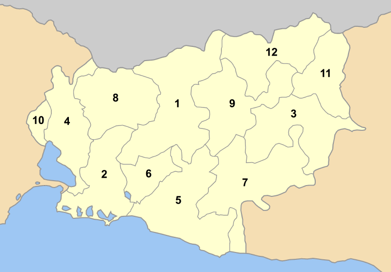 Map of Rodopi prefecture (Greece) with administrative divisions (municipalities and communities) numbered in alphabetical order (in greek). Legend: 1 Δήμος Κομοτηνής - Komotini 2 Δήμος Αιγείρου - Egiros 3 Δήμος Αρριανών - Arriana 4 Δήμος Ιάσμου - Iasmos 5 Δήμος Μαρώνειας - Maronia 6 Δήμος Νέου Σιδηροχωρίου - Neo Sidirochori 7 Δήμος Σαπών - Sapes 8 Δήμος Σώστου - Sostis 9 Δήμος Φιλλύρας - Fillyra 10 Κοινότητα Αμαξάδων - Amaxades 11 Κοινότητα Κέχρου - Kechros 12 Κοινότητα Οργάνης - Organi